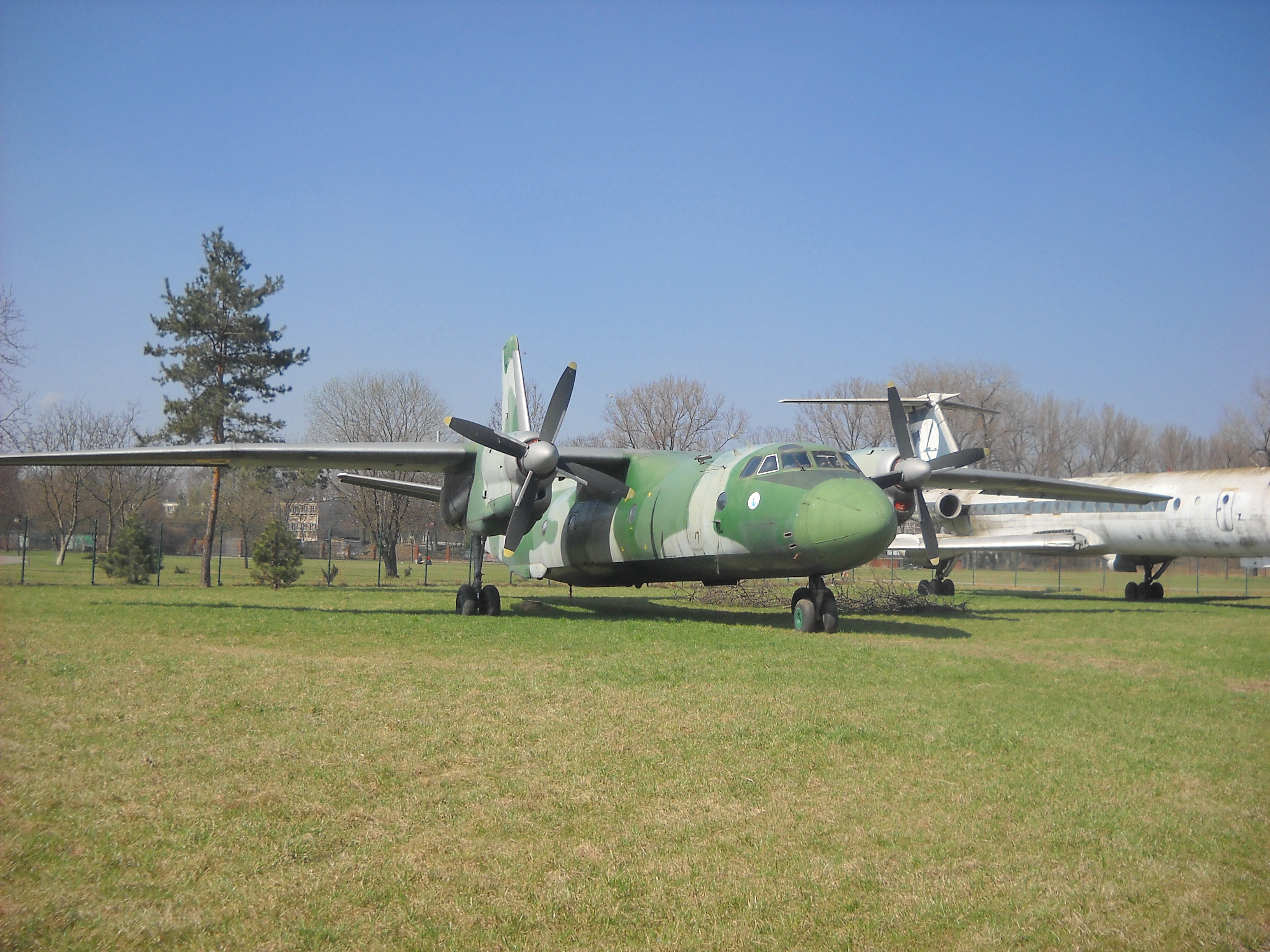 Wycofany samolot transportowy An-26 uziemiony na terenie lotniska Kraków-Czyżyny, w tle widoczny Tu-134.